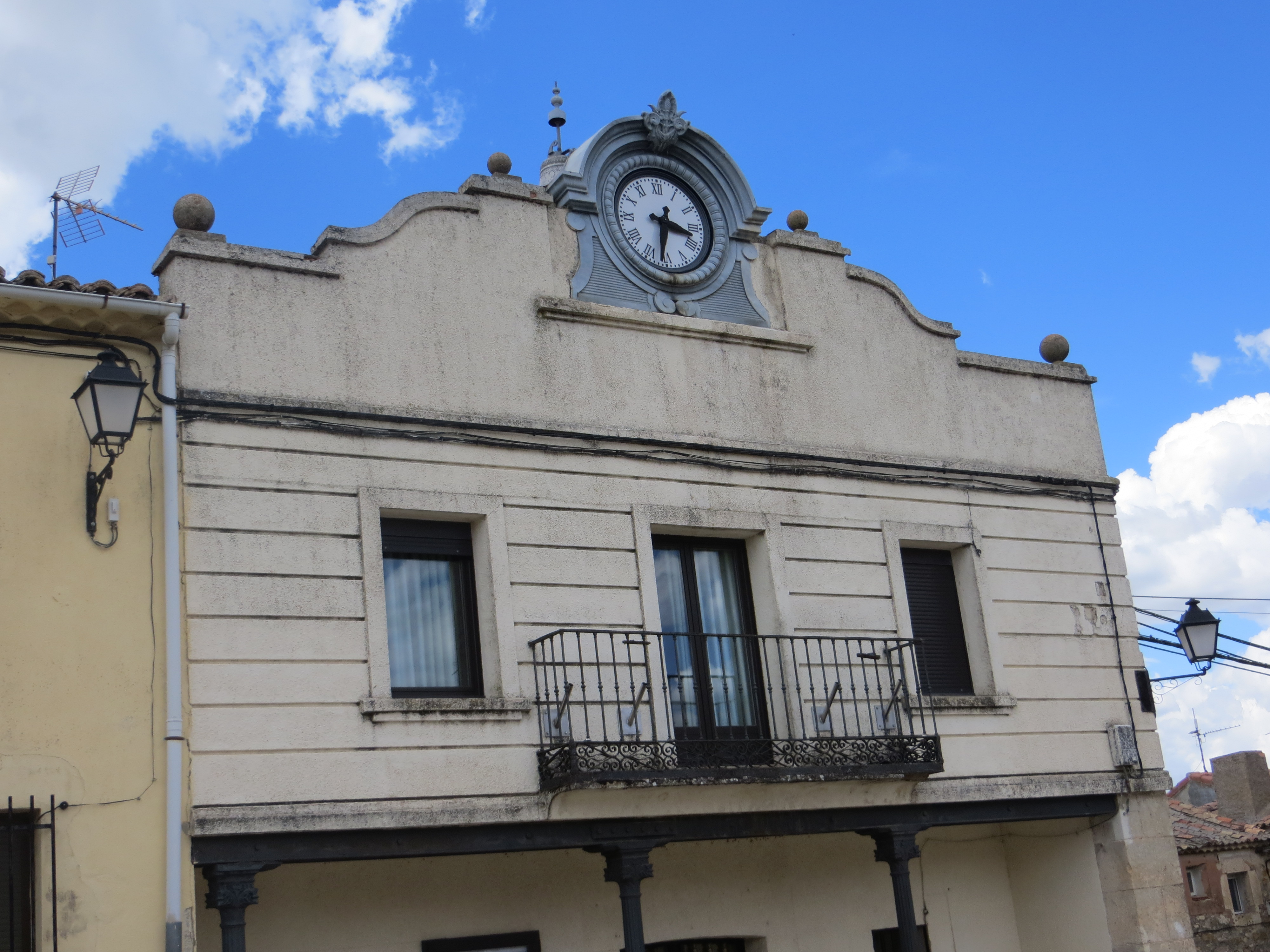 Detalle del balcón y el reloj de la Casa Consistorial de Baraona.